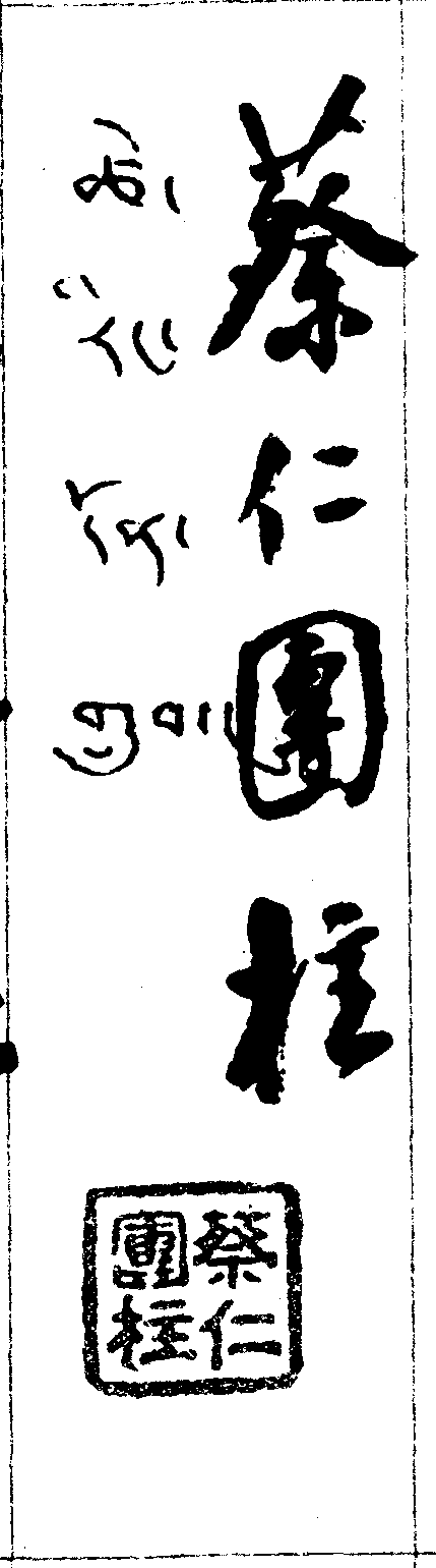 中文（台灣）: 第一屆立法委員、制憲國民大會代表蔡仁團柱的簽章